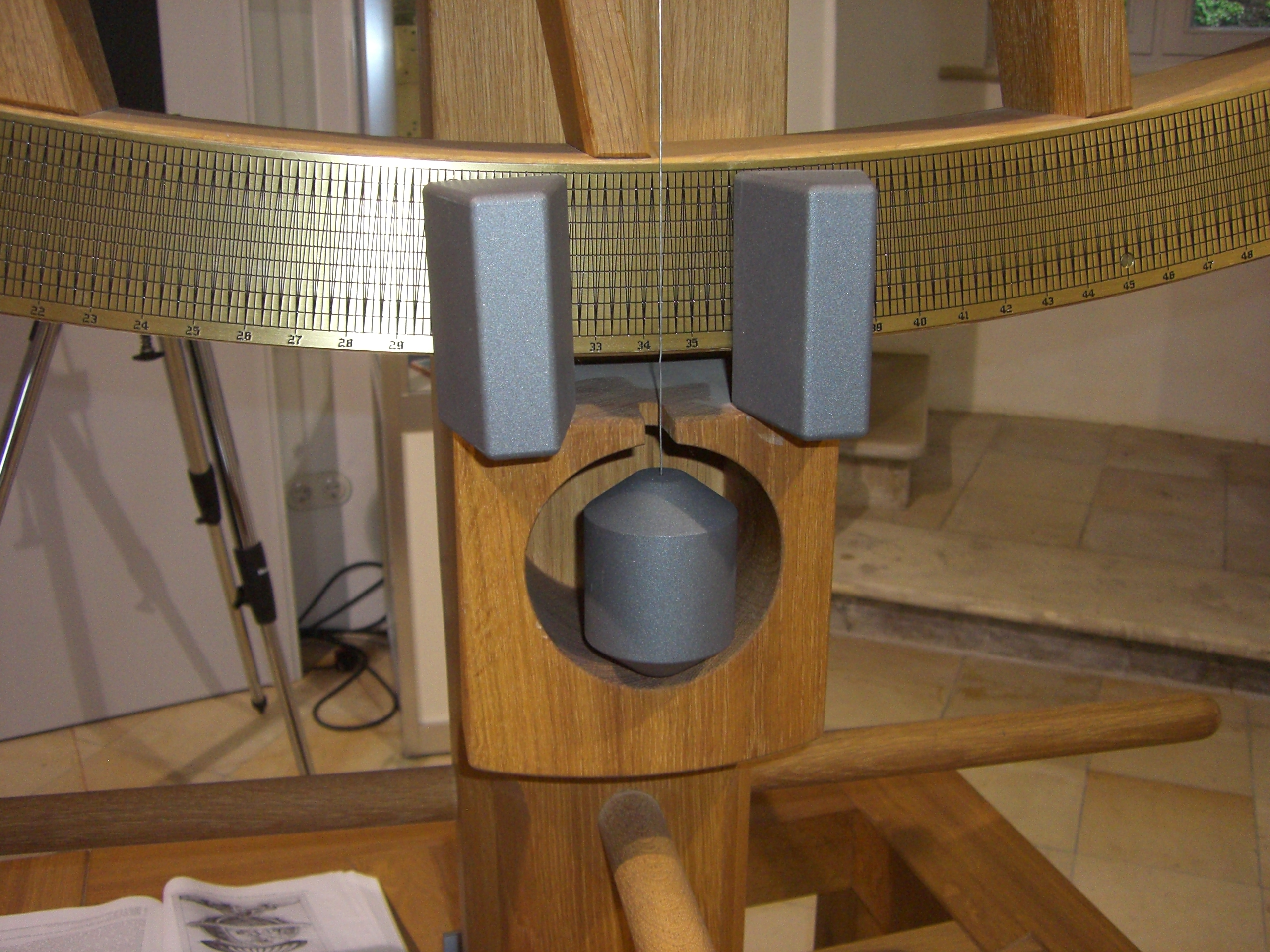 Detail eines Modells des Augsburger Quadranten im Römerturm in Göggingen